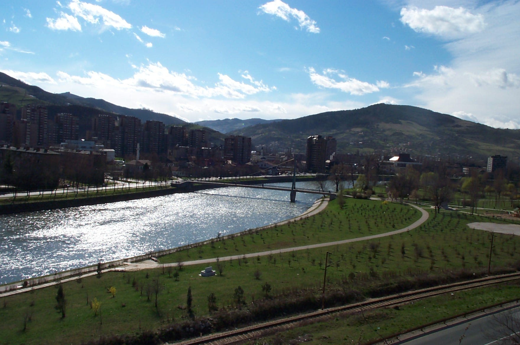 Vue de la Ville de ZENICA (Bosnie Herzégovine)